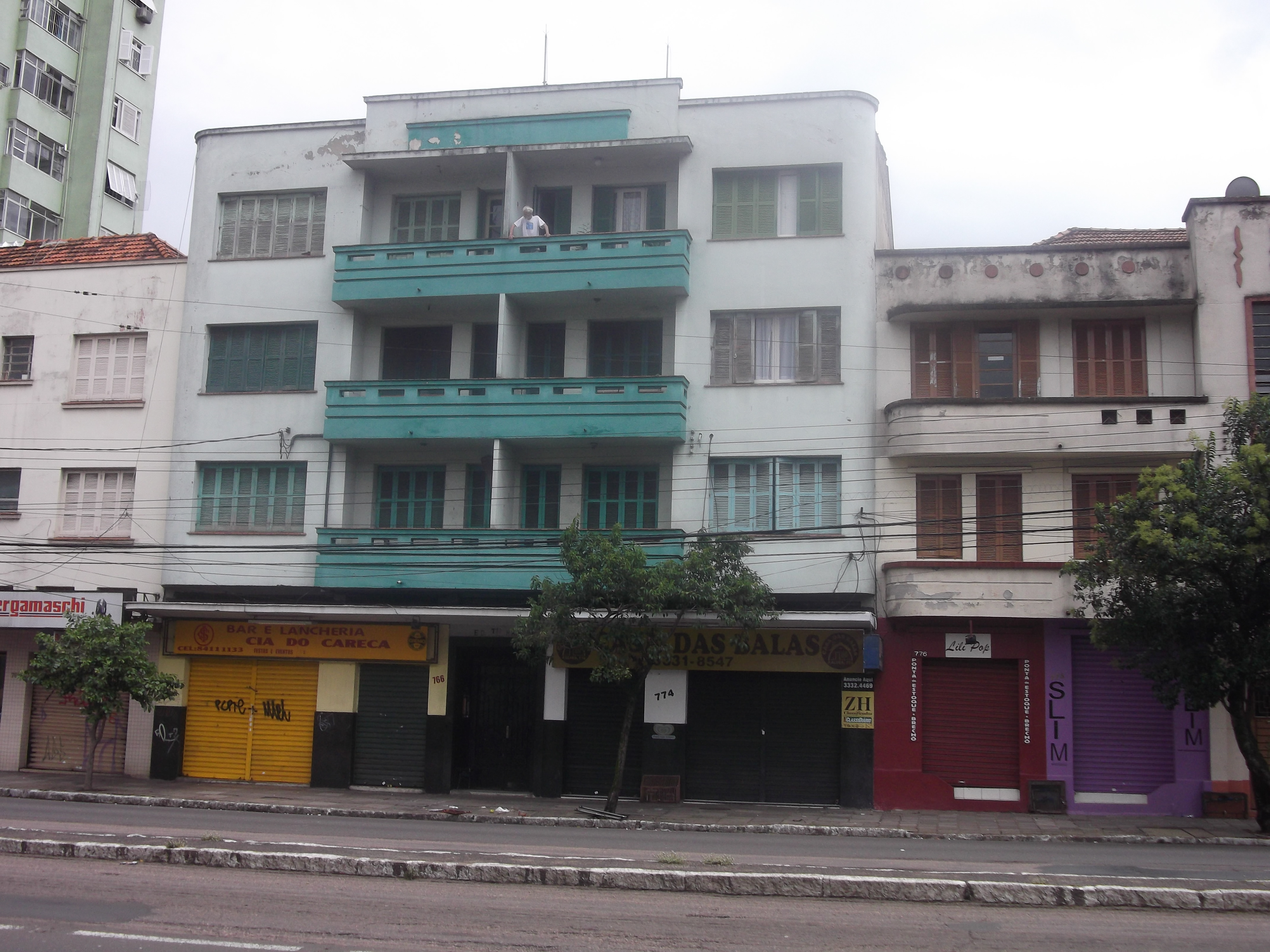 Avenida Protásio Alves n. 766, Rio Branco, Porto Alegre, Brasil